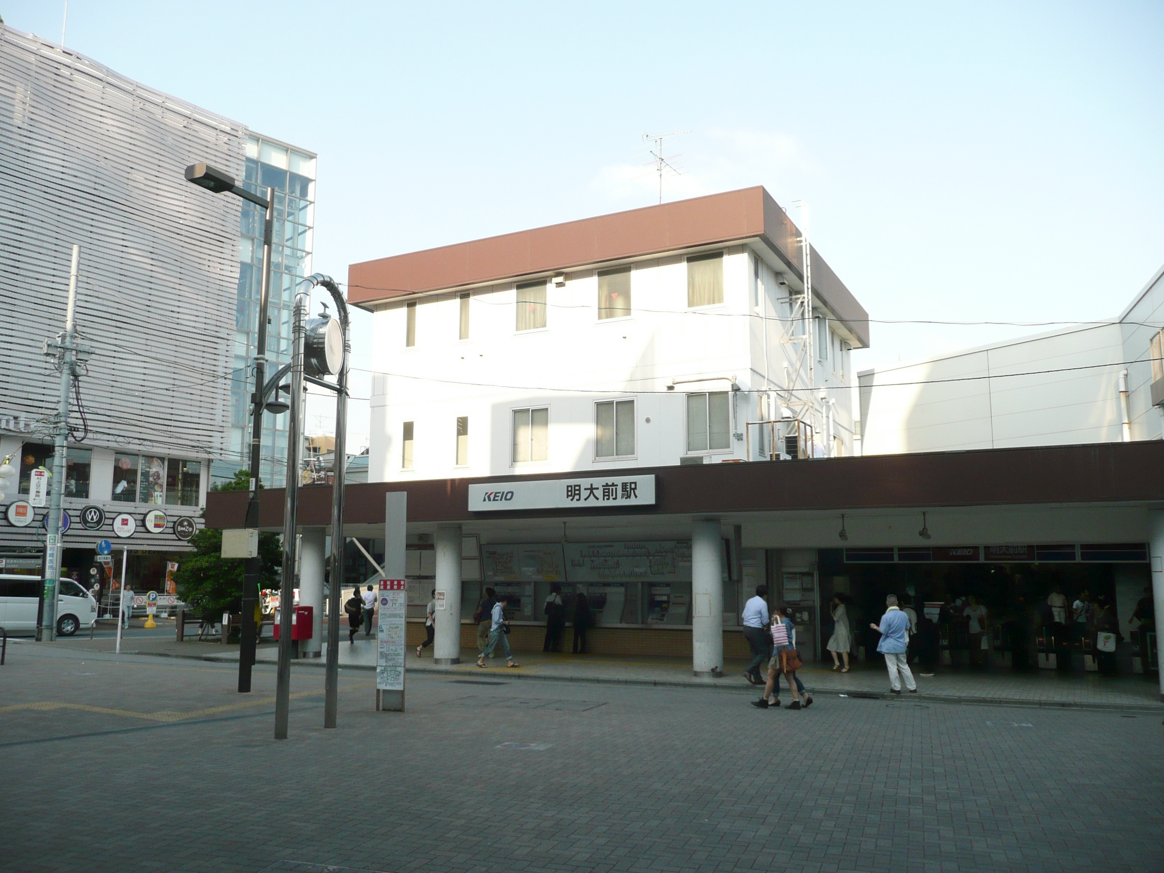 明大前駅。左側の建物はフレンテ明大前